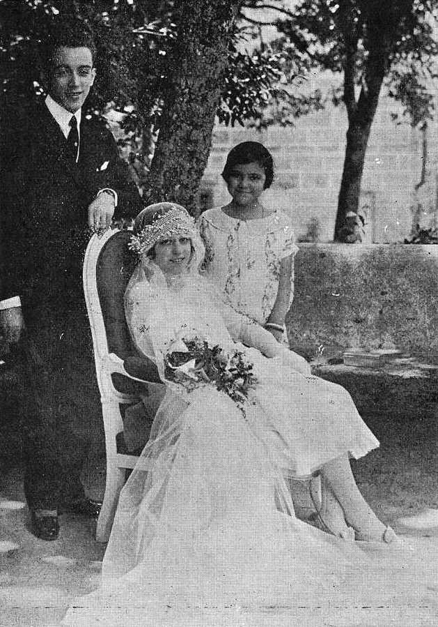 Voda de Isidro Parga Pondal e Avelina Peinador Porrúa, fotografía en Vida Gallega 1925